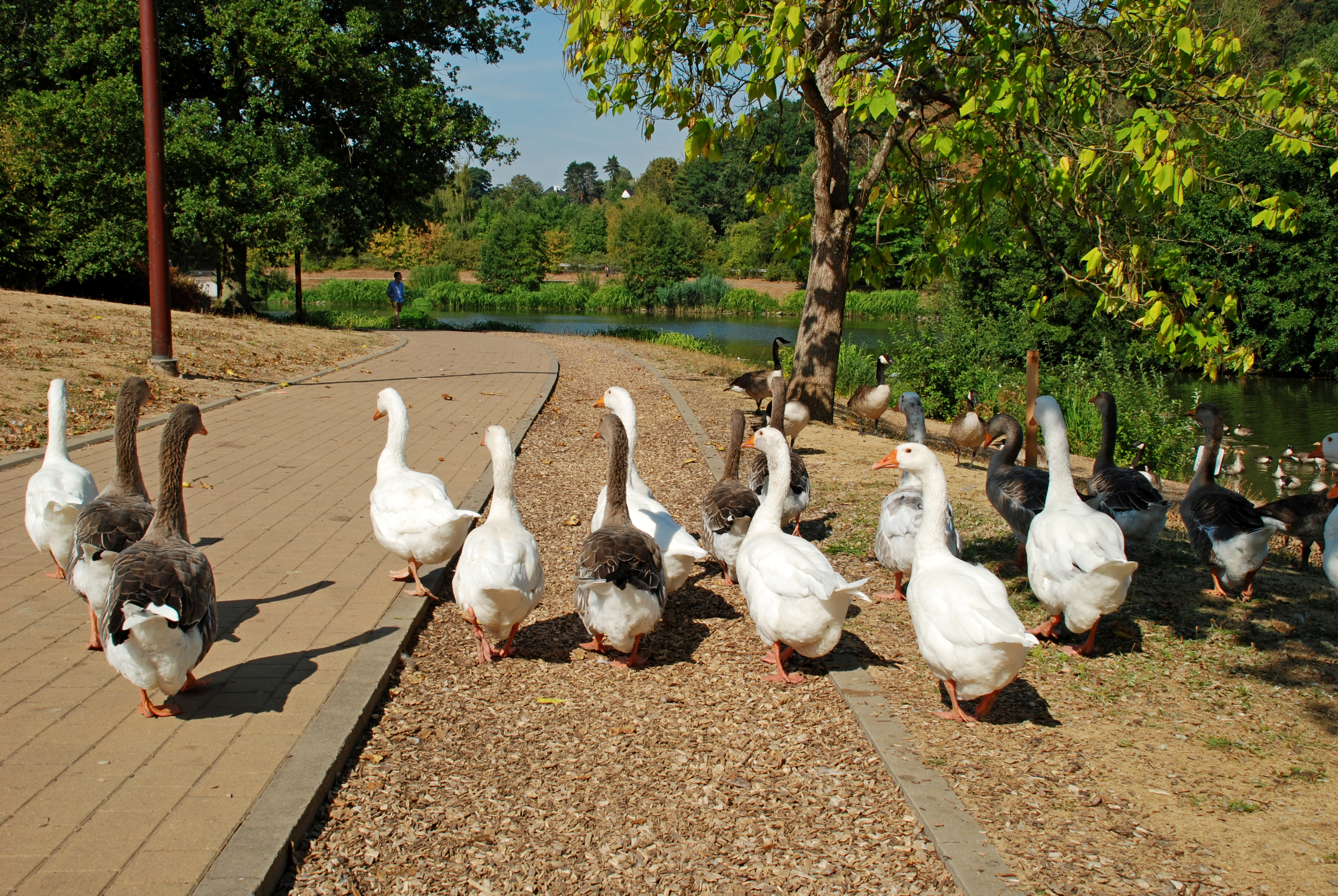 Belgique - Brabant wallon - Ottignies-Louvain-la-Neuve - Lac de Louvain-la-Neuve - oies sur la piste finlandaise